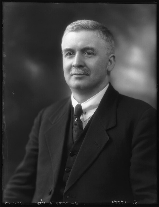 Rhys John Davies